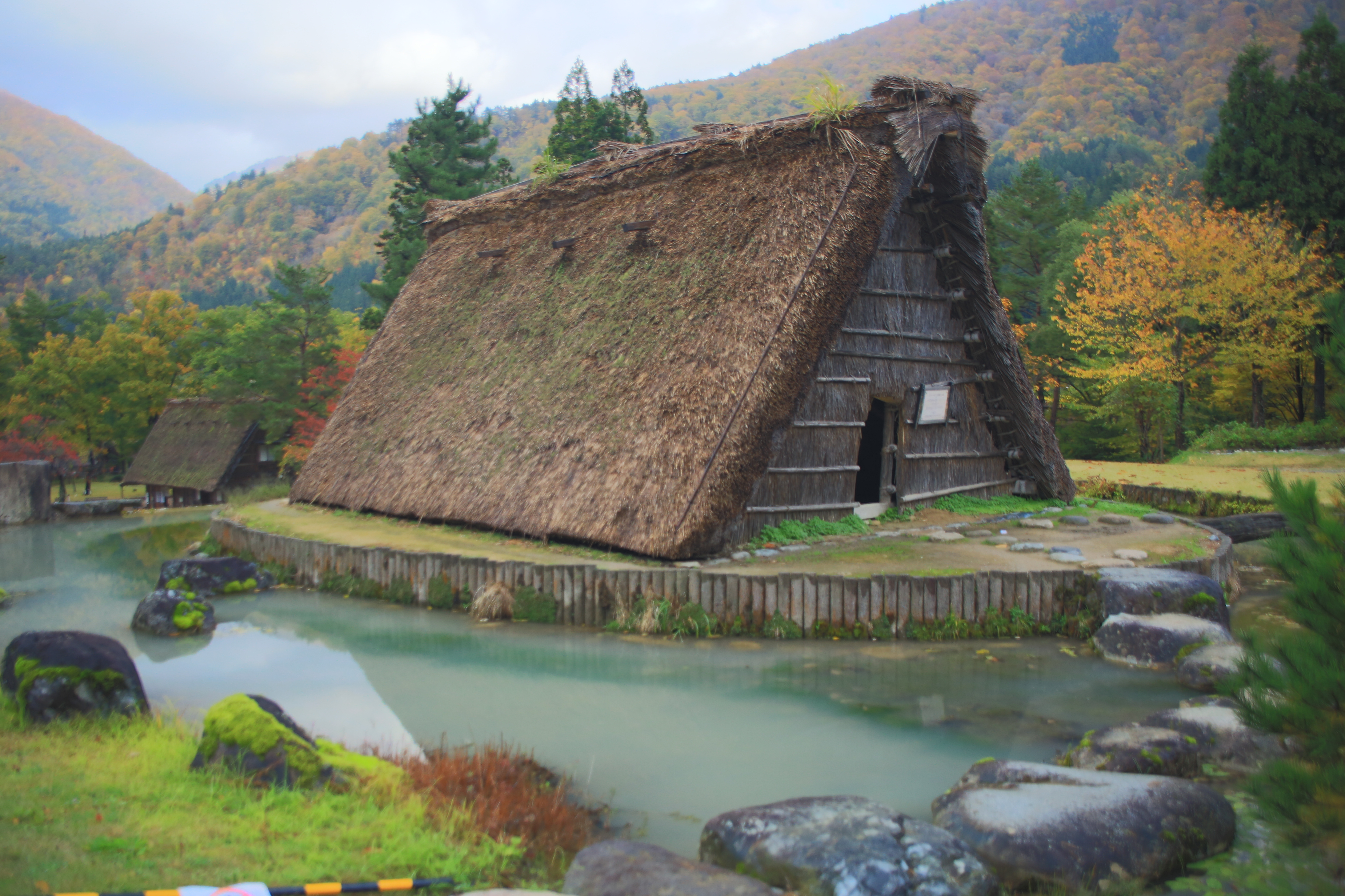 20171030_Shiragawaminka_2296